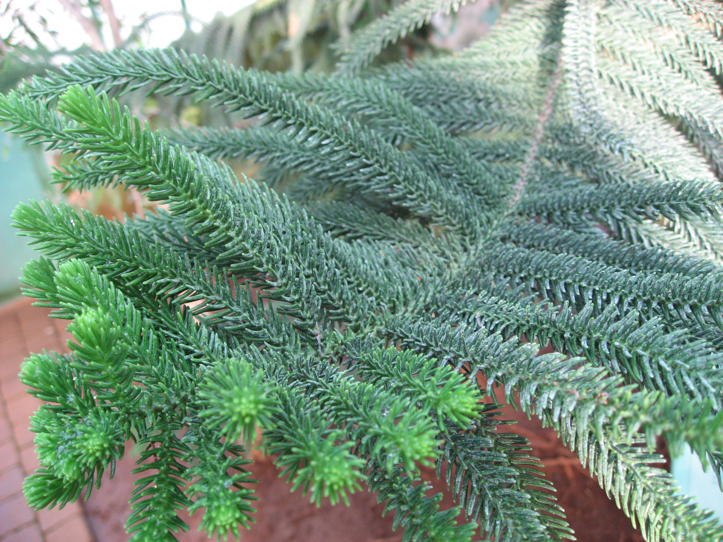 Araucaria luxurians in Serres d'Auteuil Map: 48° 50' 49" N 2° 15' 8" E